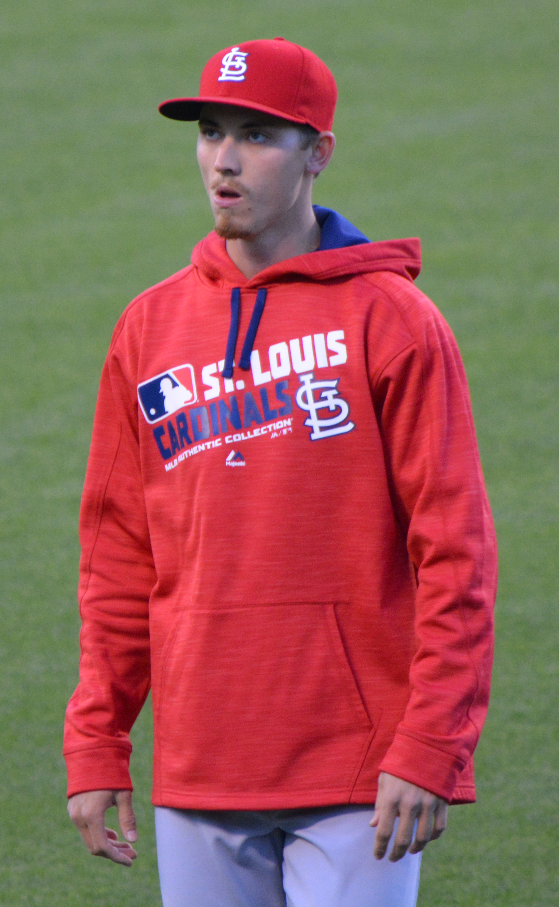 Luke Weaver